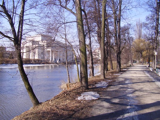 Kalisz - Teatr im. Wojciecha Bogusławskiego